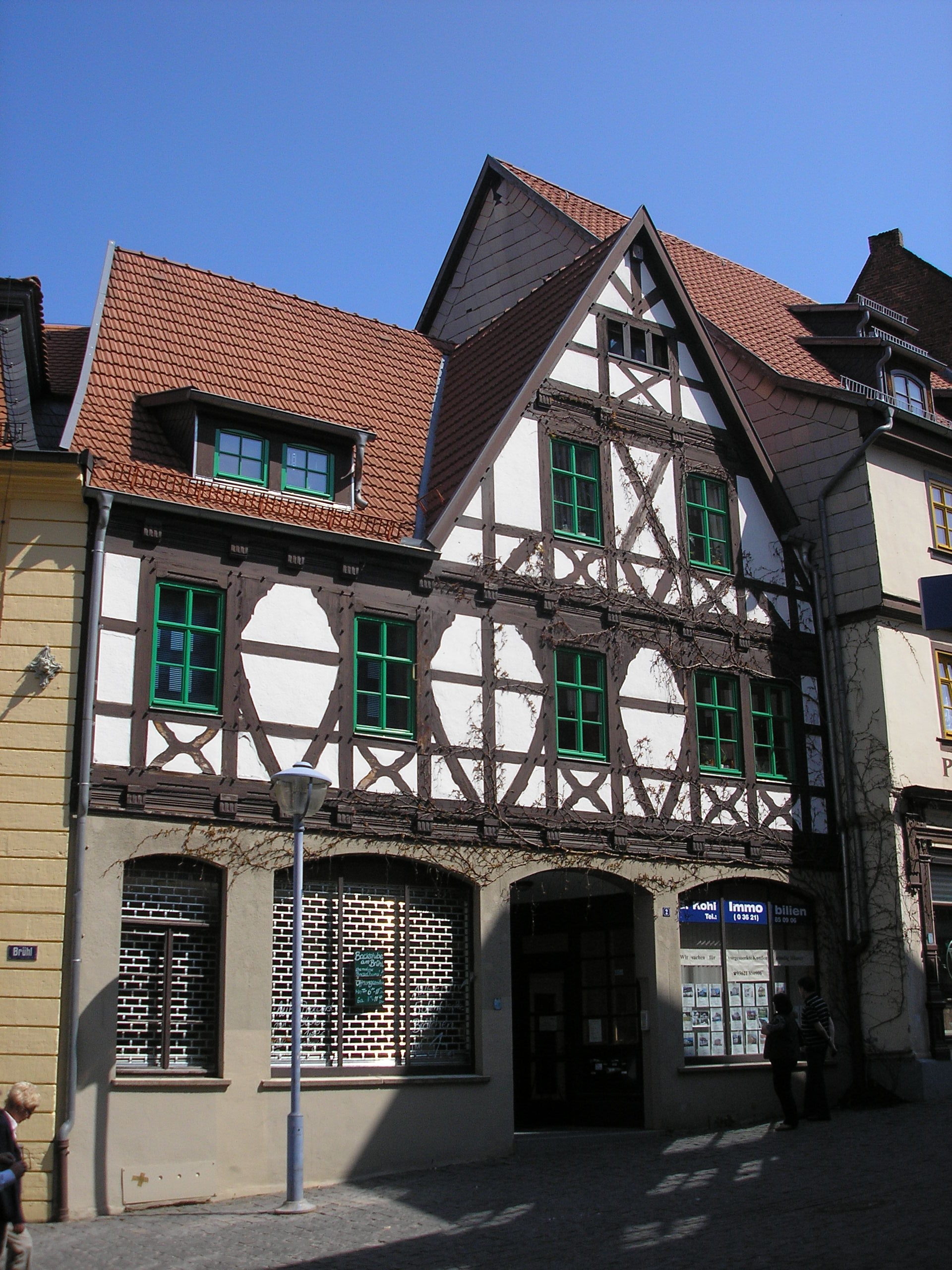 Ein Haus am Brühl in Gotha (Thüringen).